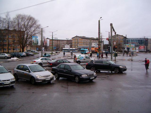 Endla ja Tulika tänava ristmik. Sõpruse puiestee algus. Tallinn.